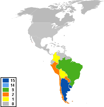 Mapa de las Américas, que muestra a los países que han ganado la Copa América, desde su primera edición en 1916 hasta la fecha.